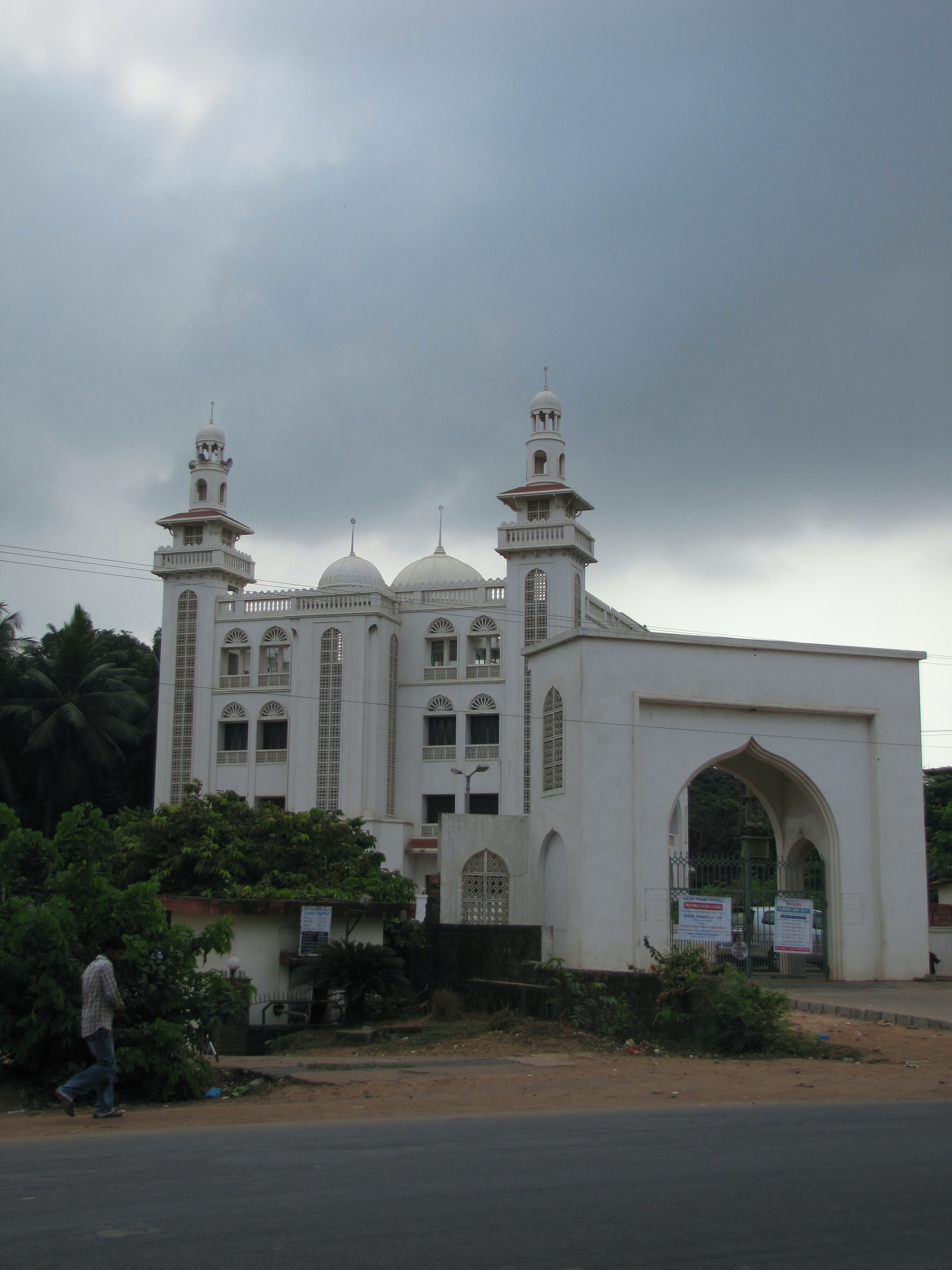 Masjid Ali Taqwa at Paumpwell, Mangalore